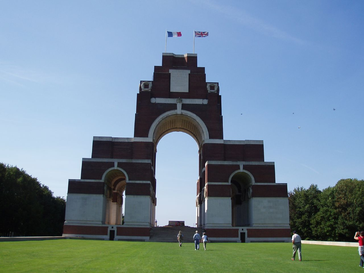 Thiepval (Somme, France) Le Mémorial, vu de face, en arrivant sur le site.